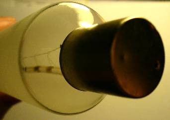 Linolite